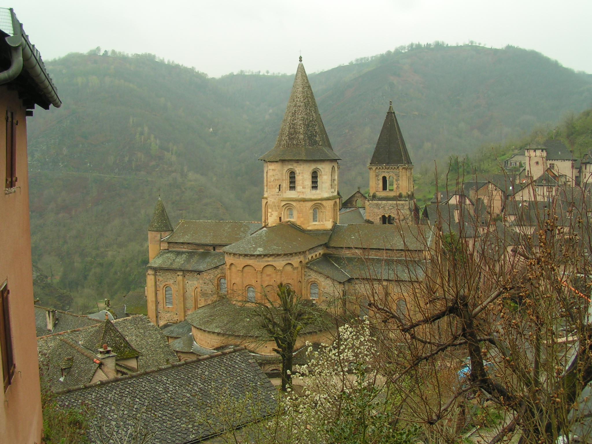 Village de Conques et abbatiale